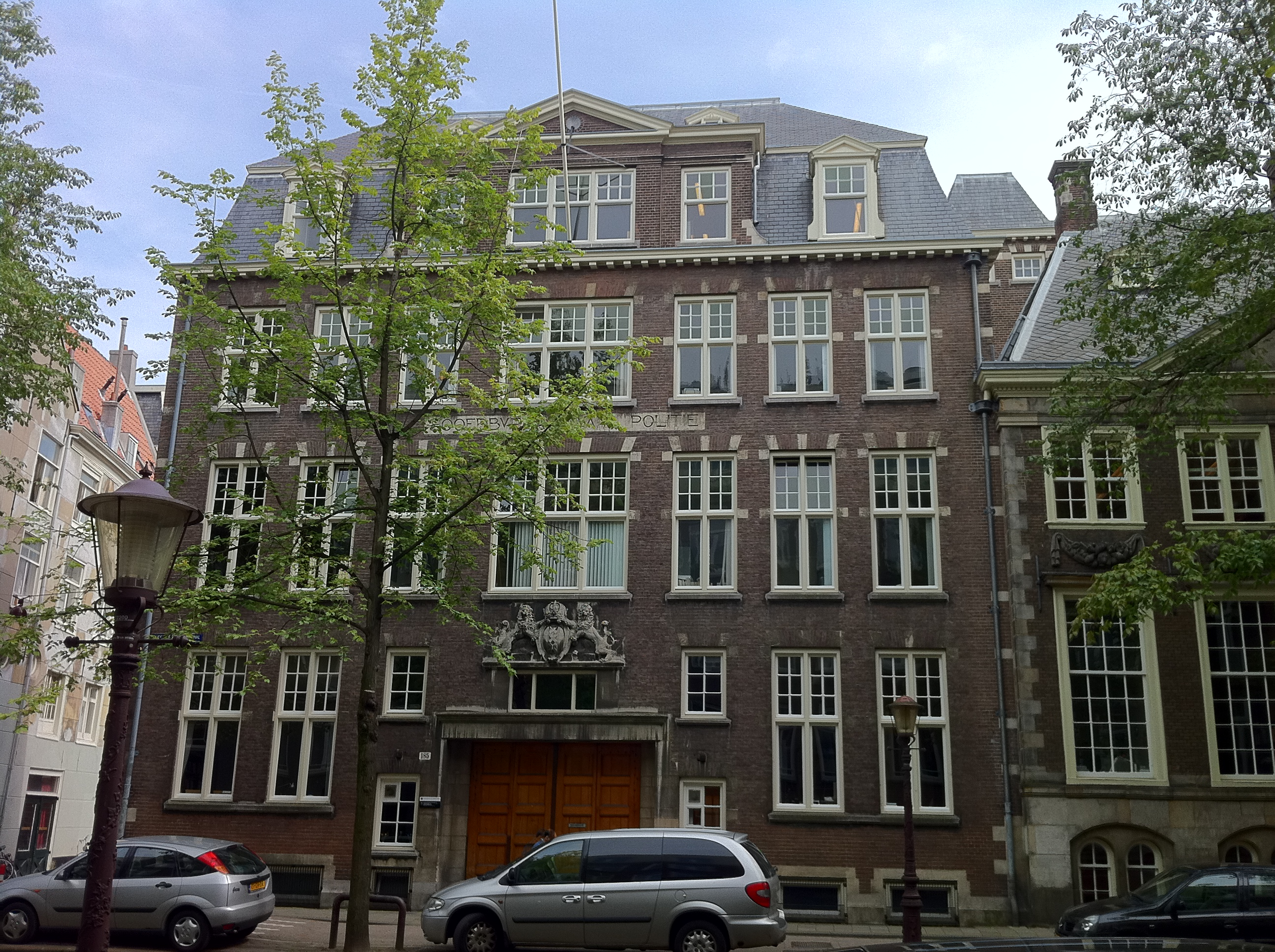 Hoofdbureau van Politie, Oudezijds Achterburgwal Amsterdam